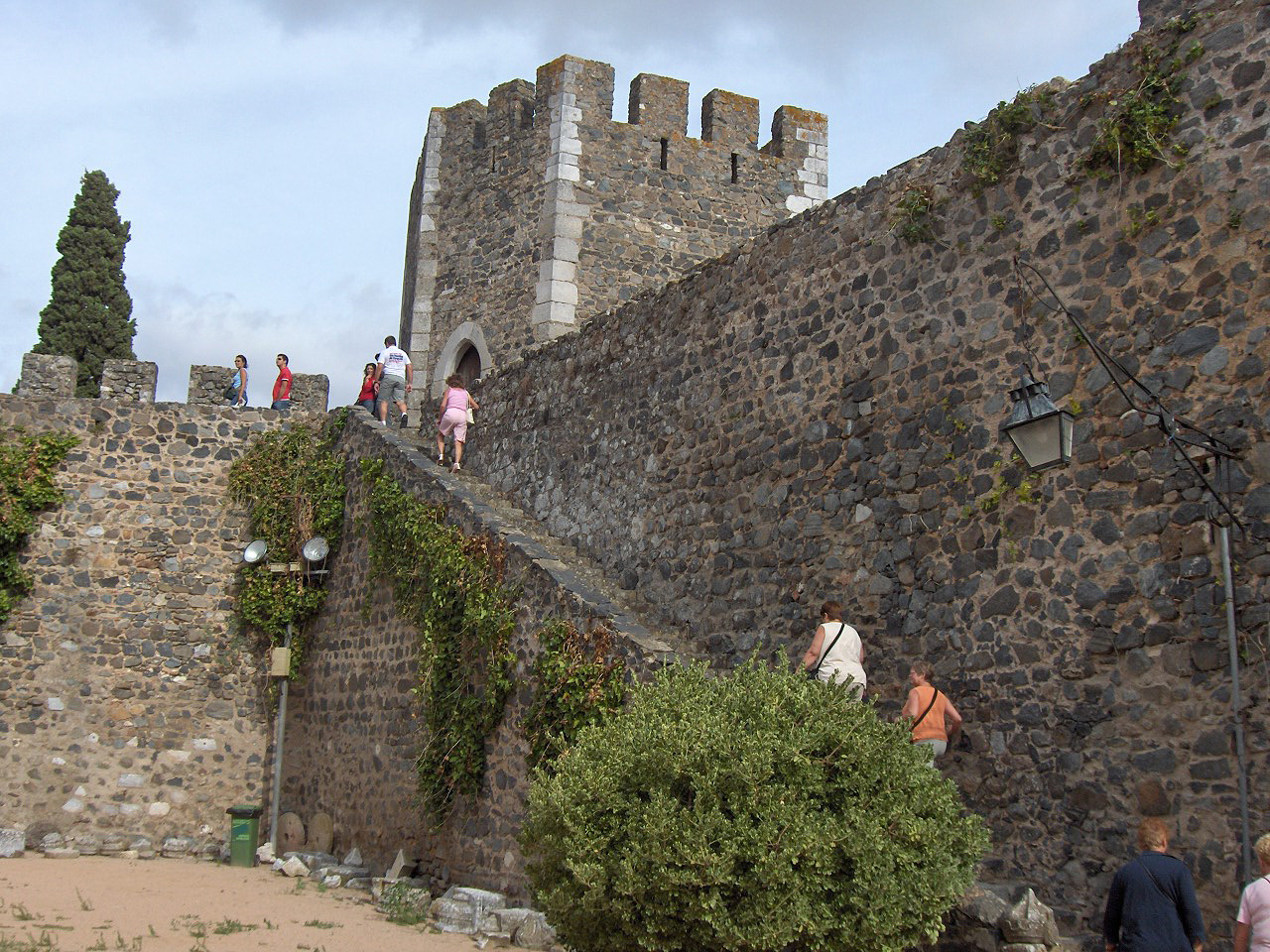 Castle of Beja, Portugal